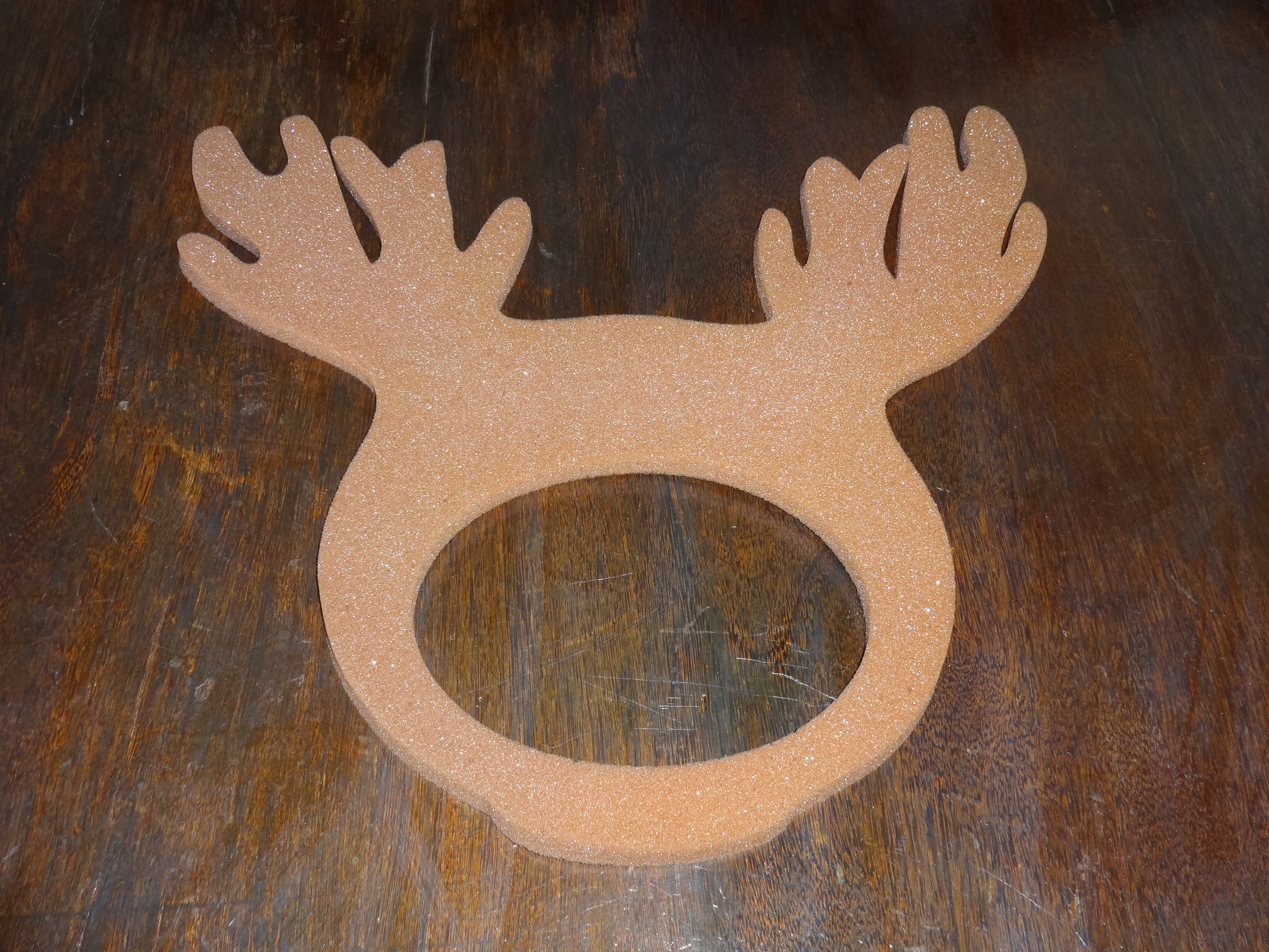 Esponja de chifre de alce.